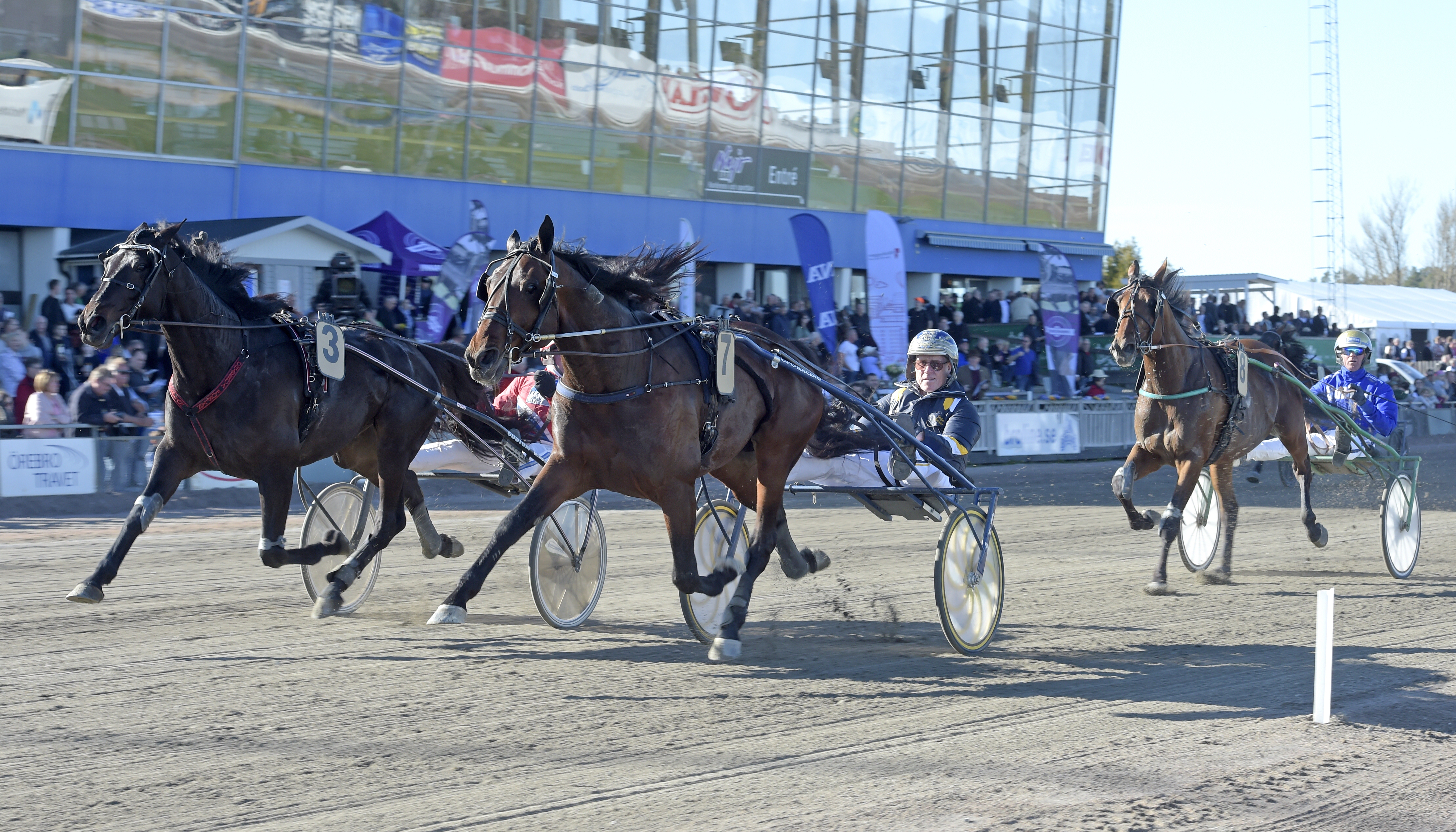 Volstead och Stefan Melander vinner Gulddivisionen på Örebrotravet den 5 maj 2018 före Charrua Forlan och Deuxieme Picsous.